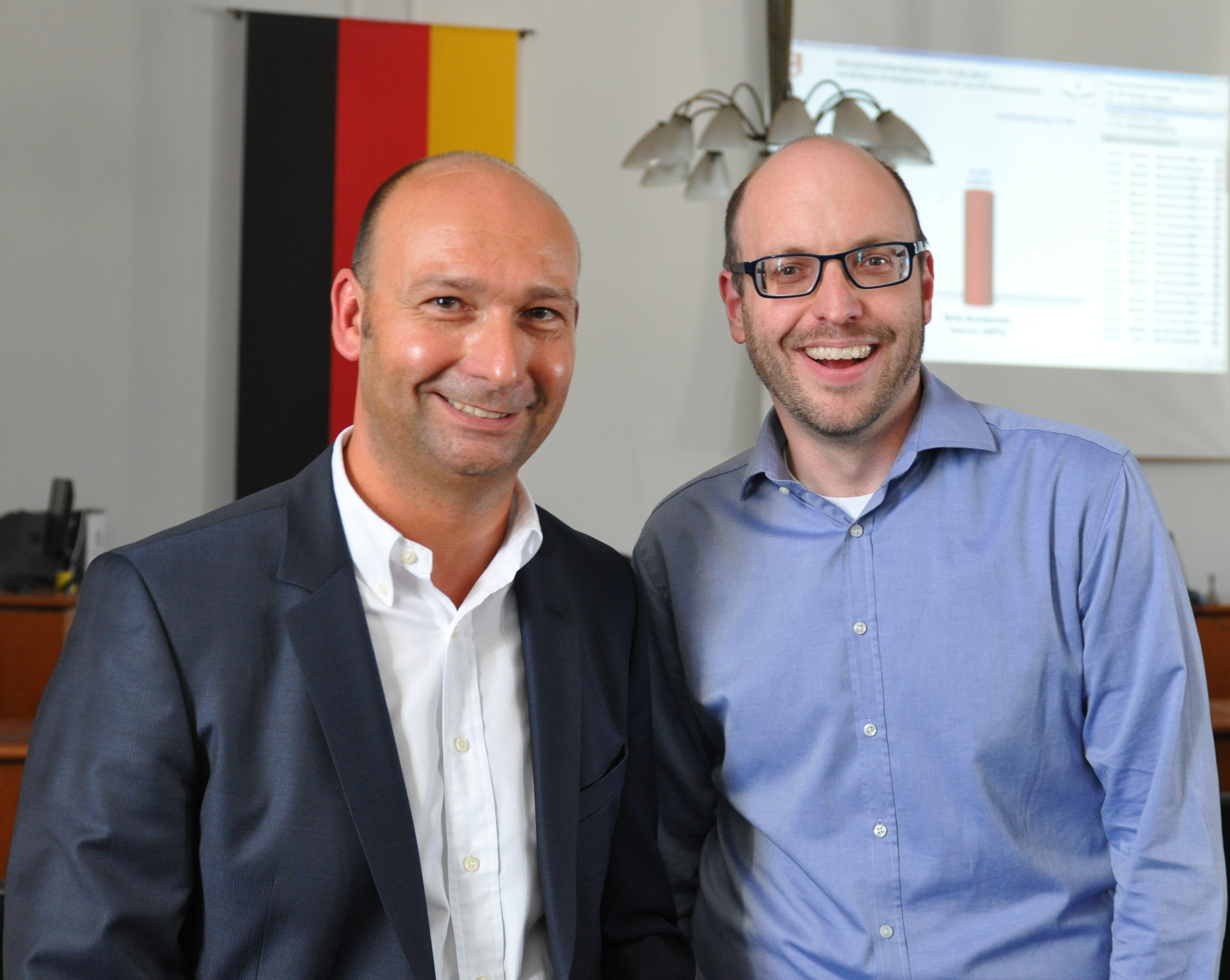 Der ehemalige Bürgermeister Stefan Freitag und der ehemalige Landtagsabgeordnete Marc Ratajczak (CDU)